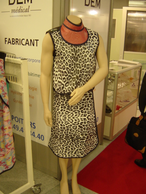 Photo d'un tablier plombé utilisé en radiologie médicale par les opérateurs lors d'exposition aux rayonnements. Photo prise au CNIT de La Défense à l'occasion des JFR. Auteur et Date : Raziel {boudoir} 24 octobre 2006 à 23:31 (CEST)